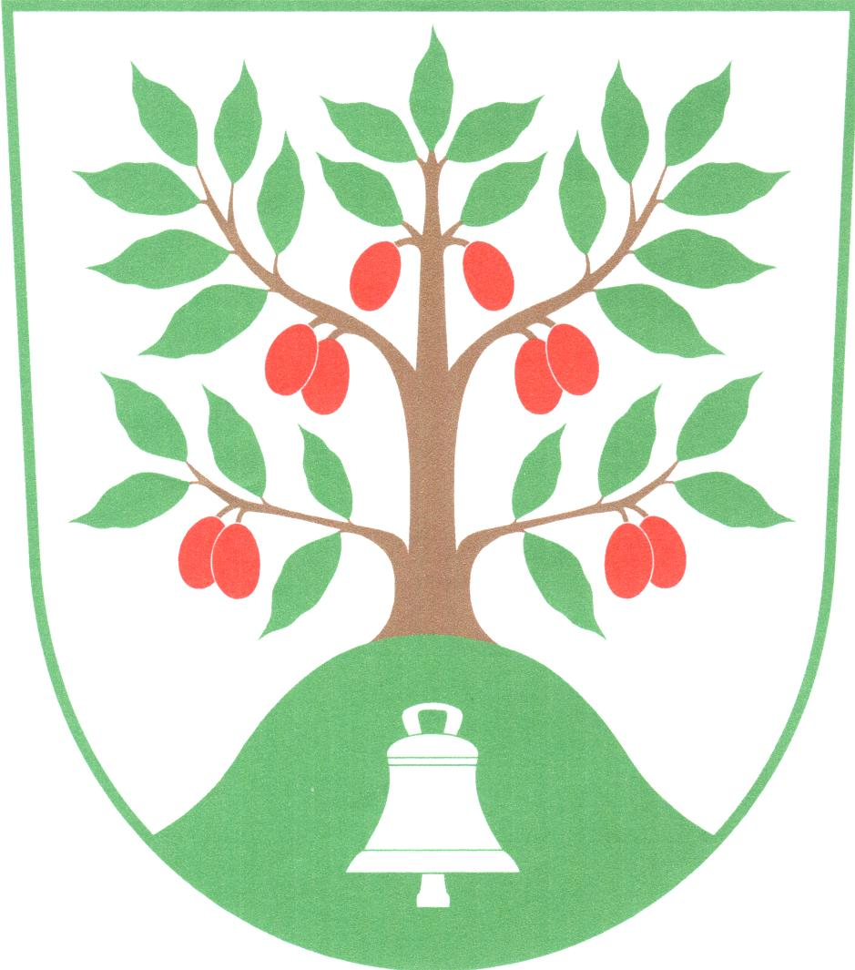 Znak obce Dřínov (okres Mělník)